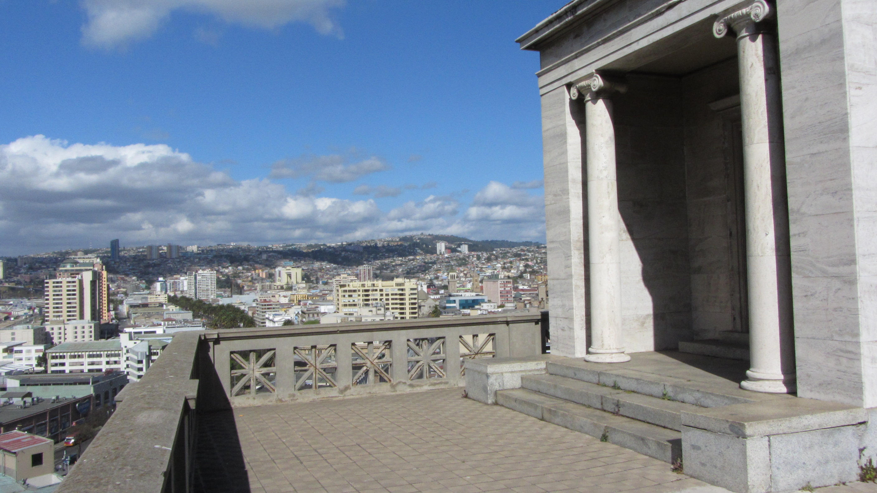 Cementerio N.º 1 o Cementerio General de Valparaíso This is a photo of a national monument in Chile: 984